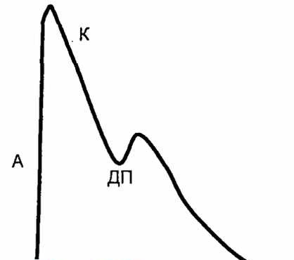 Графички запис артеријског пулса начињен сфигмографом.